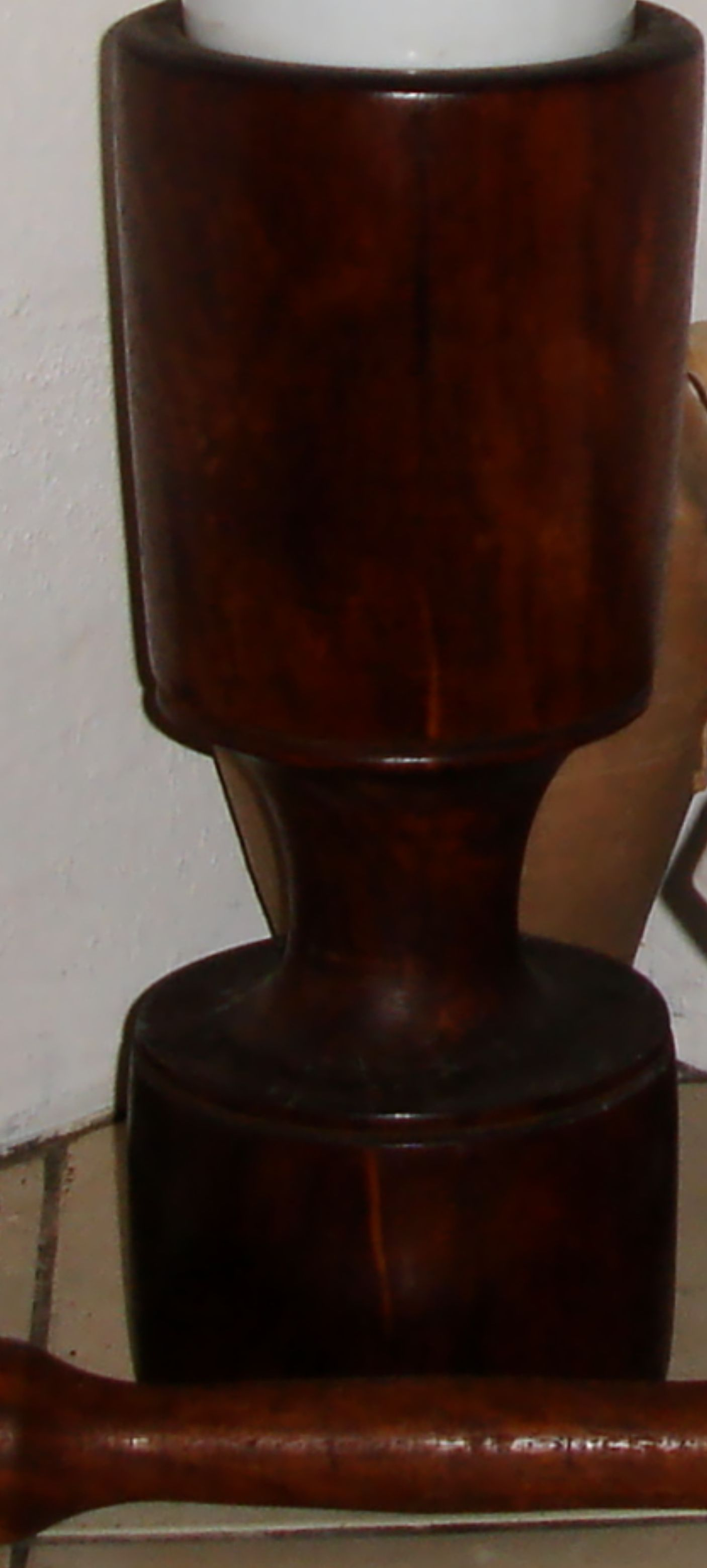 Pilão, O pilão é um utensílio culinário essencial na cozinha africana